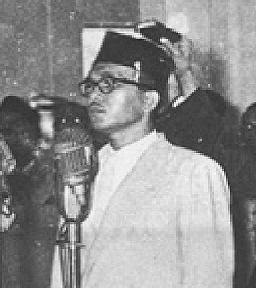 Бурхануддин Харахап, премьер-министр Индонезии